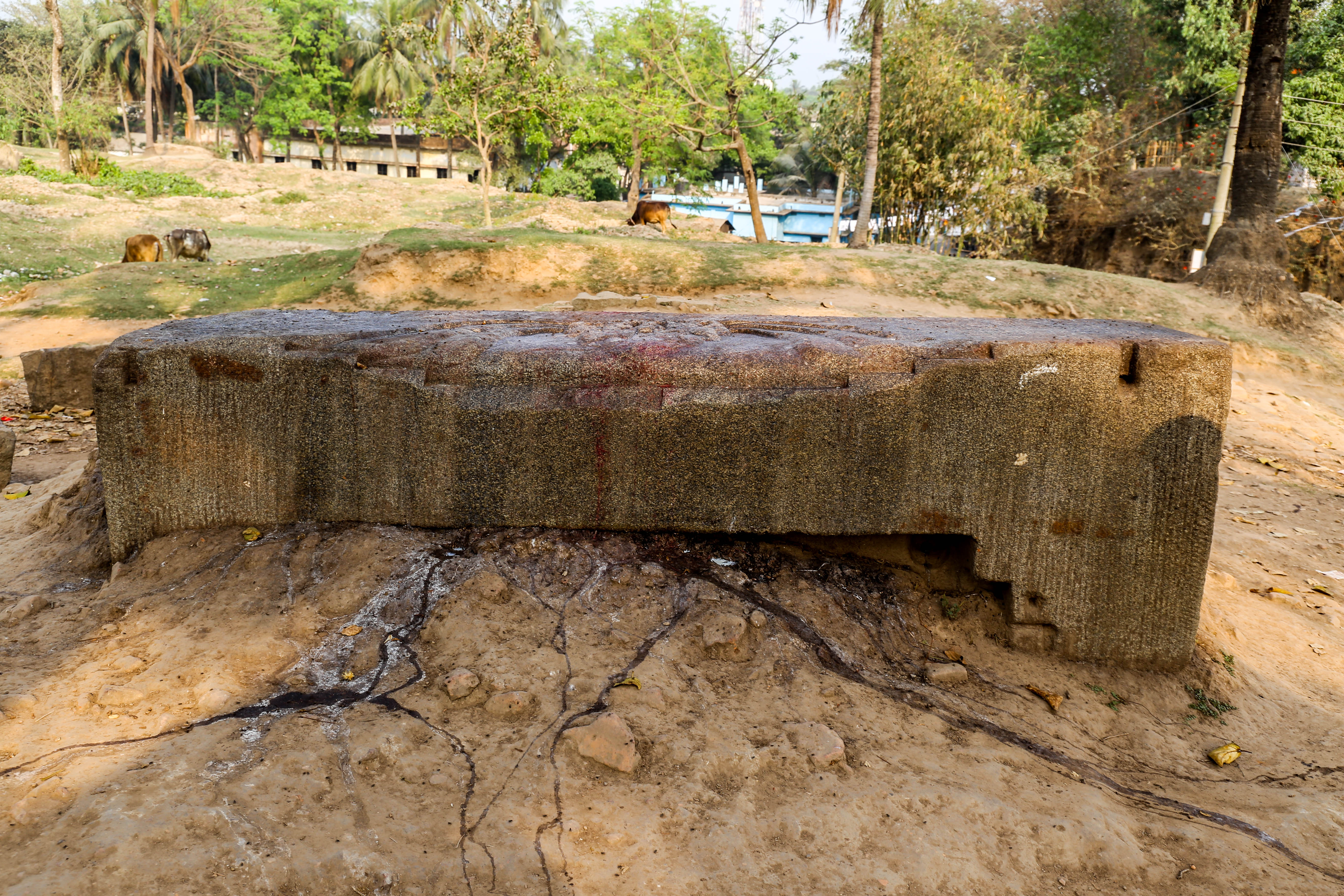 এটি দীর্ঘাকার এবং চৌকাণাকৃতির মর্সণ পাথর যা সাধারণত প্রকৃতিতে পাওয়া যায় না। ধারণা করা হয়, পরশূরাম এটি সংগ্রহ করে মসৃণ করে বলী দেয়ার কাজে ব্যবহার করতেন। হিন্দু রমণীগণ এ পাথর দুধ ও সিঁদুর দিয়ে স্নান করাতো। এখনো কেউ কেউ এ পাথরে দুধ ও সিঁদুর মেখে পুজা করেন।